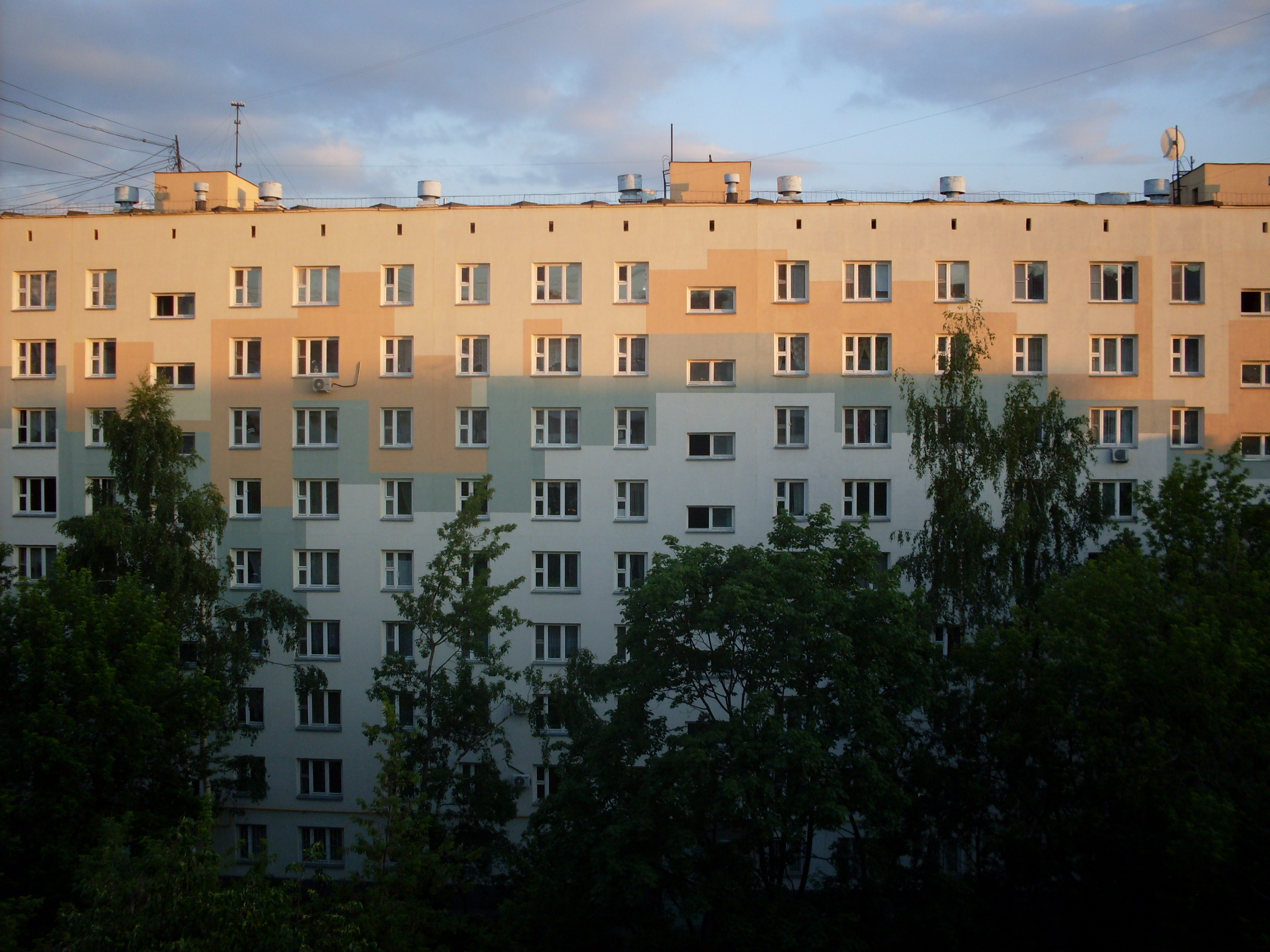 Россия, Москва, Улица Новороссийская, дом 12. Дом серии 1-515/9ш с 4 подъездами после капитального ремонта.